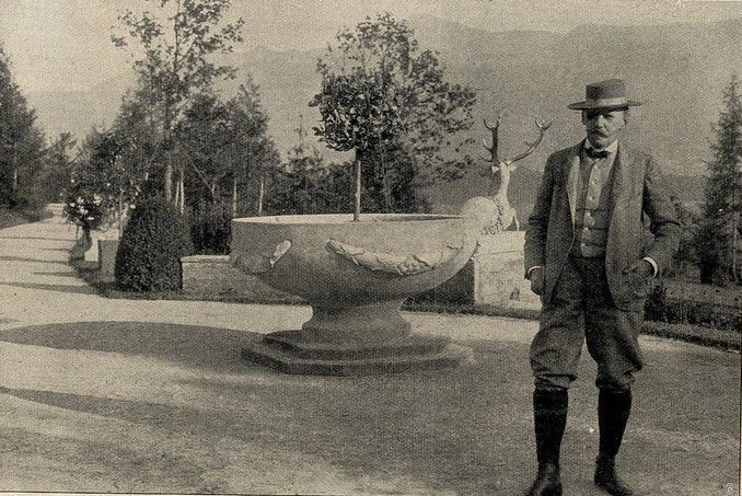 Professor Emanuel von Seidl, 1906